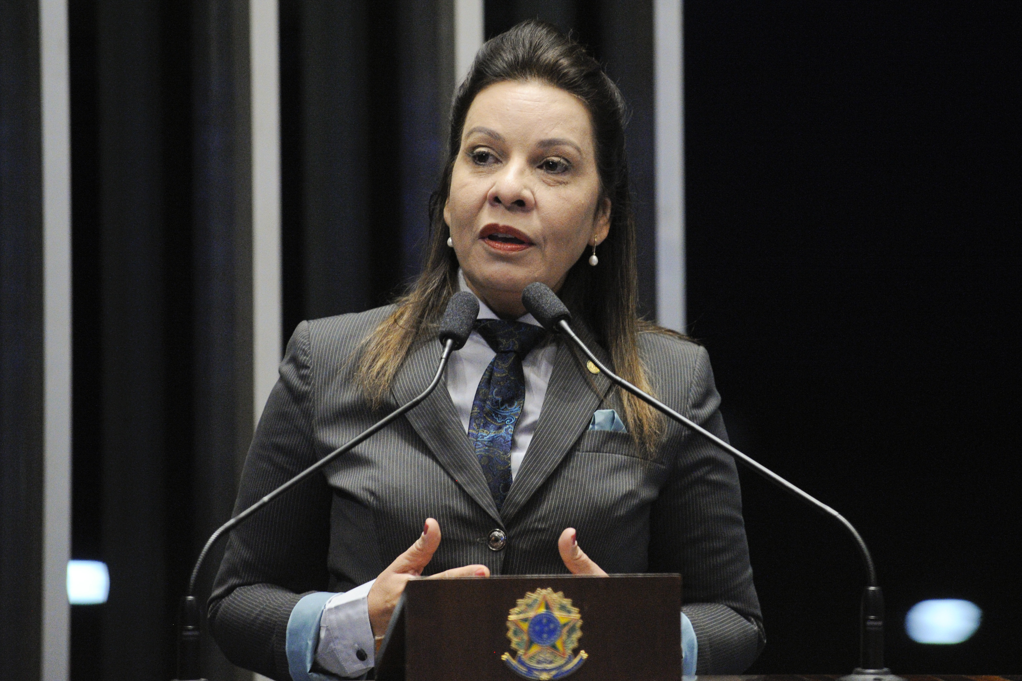 Plenário do Senado Federal durante sessão solene do Congresso Nacional destinada ao lançamento da Campanha Institucional "Mulher na Política", do Tribunal Superior Eleitoral (TSE), como incentivo à participação da mulher no Parlamento. Em discurso, deputada Raquel Muniz (PSD-MG) Foto: Edilson Rodrigues/Agência Senado